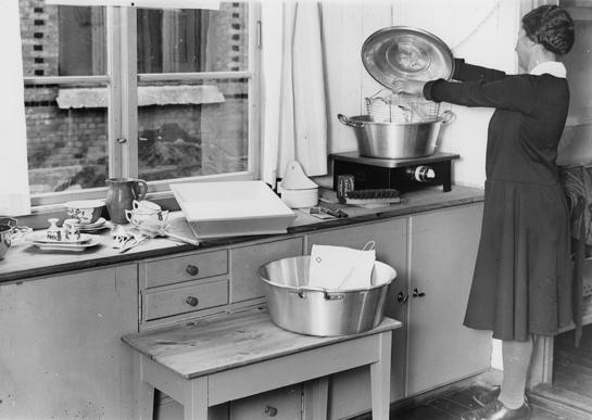 Beskrivelse: Oppvaskutstilling arrangert av Folkehelseforeningen og Østkantutstillingen 1931. Fotograf: Nanna Broch (?) Sted: Oslo Tid: 1931 Arkivreferanse: RIKSARKIVET -PA680_1_3 Tekst: "En skyllekurv av rustfri metalltråd som passer i en opvaskbalje, dertil et lokk som også svarer til baljen - det er hele historien. Med disse par redskaper kan både lægens og husmorens fordringer til en virkelig hygienisk opvask lettvint tilfredsstilles, nemlig ved skylling i kokhett vand efter såpevasken og - i sykdomstilfelle, ved kokning av opvasken".